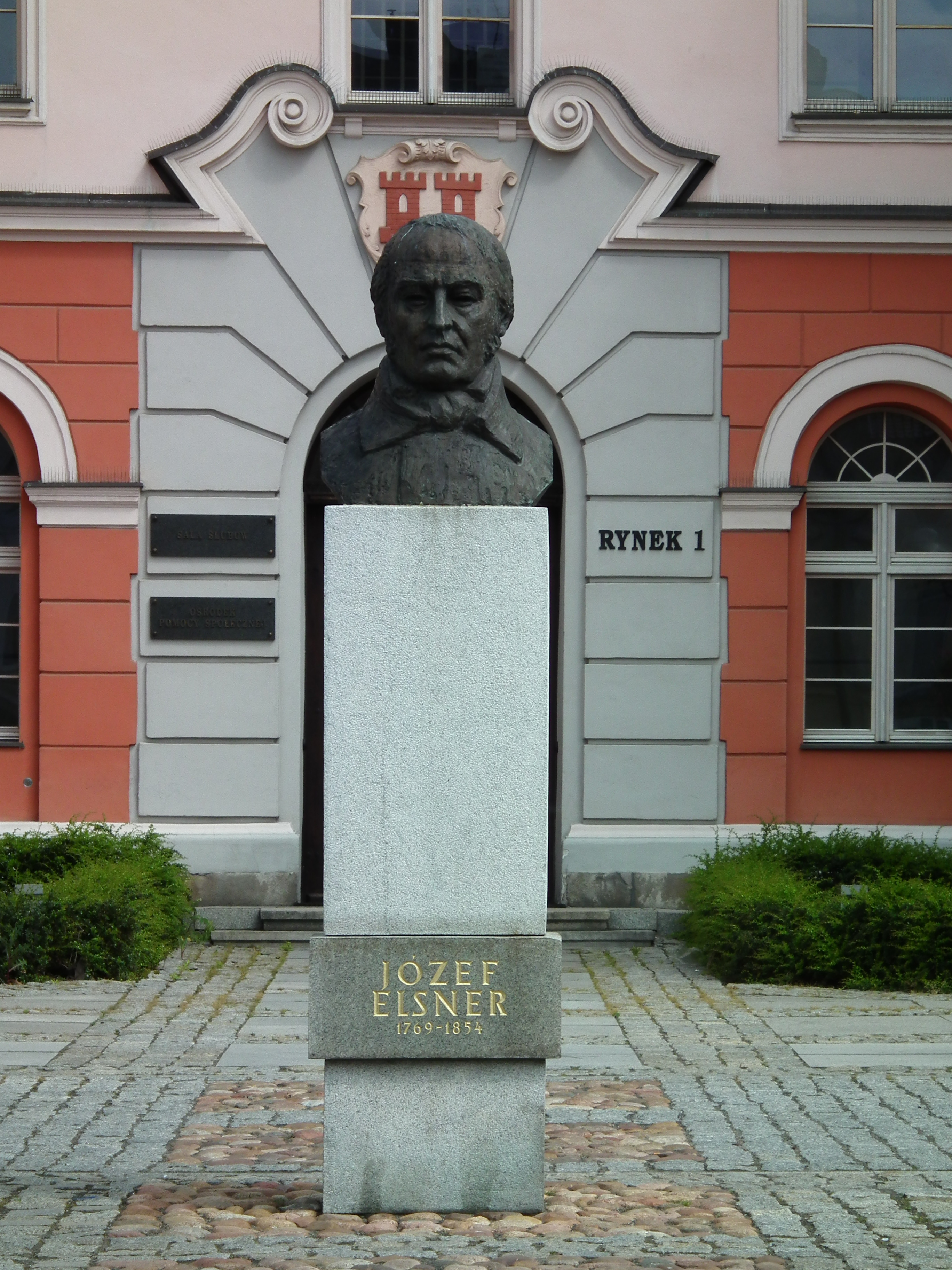 Pomnik Józefa Elsnera w Grodkowie.